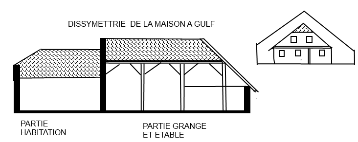 Coupe longitudinale maison à Gulf, Frise orientale